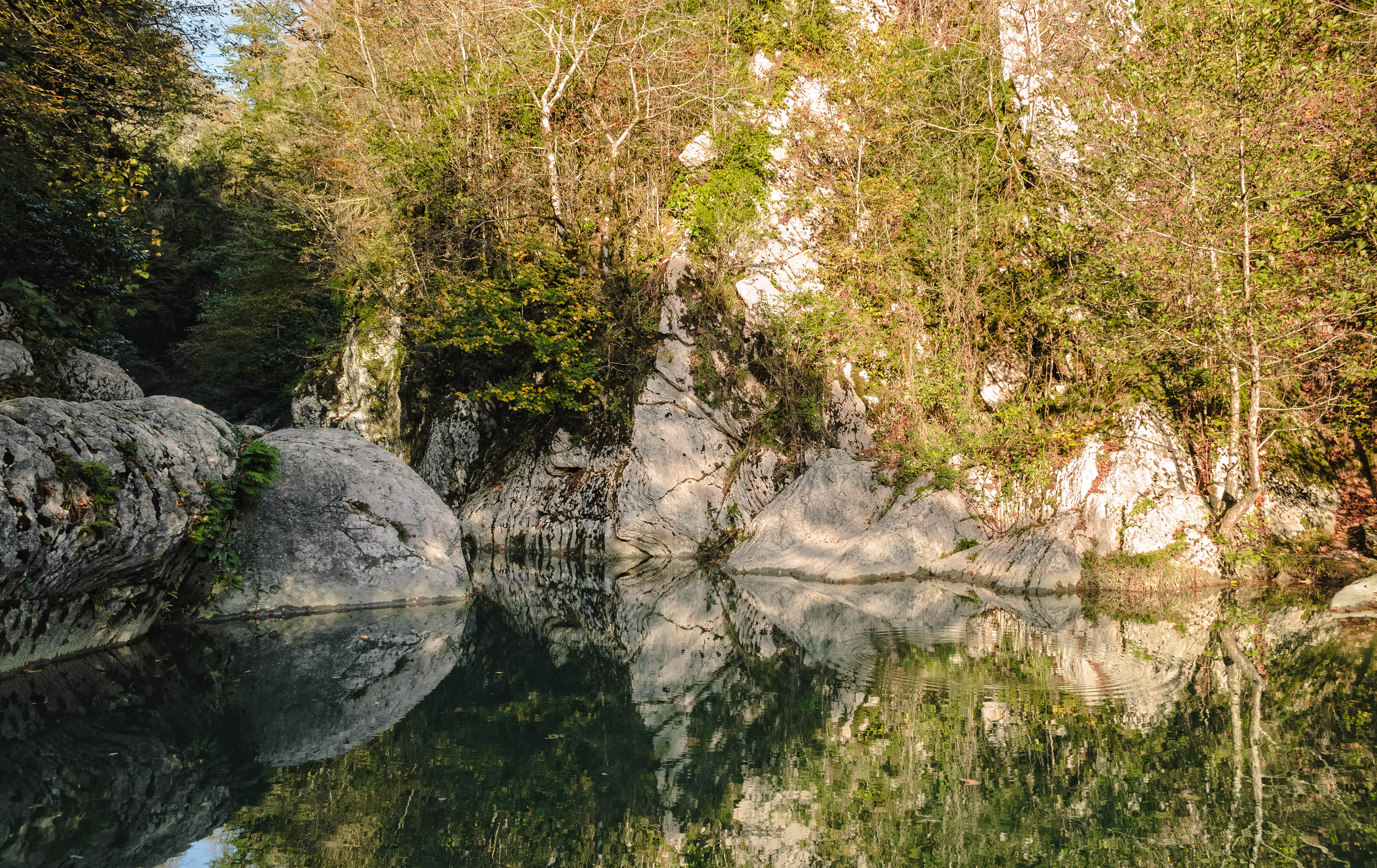 Агво-Ацкий комплекс (Белые скалы), Сочи This image is related to the protected area of Russia number 2310307